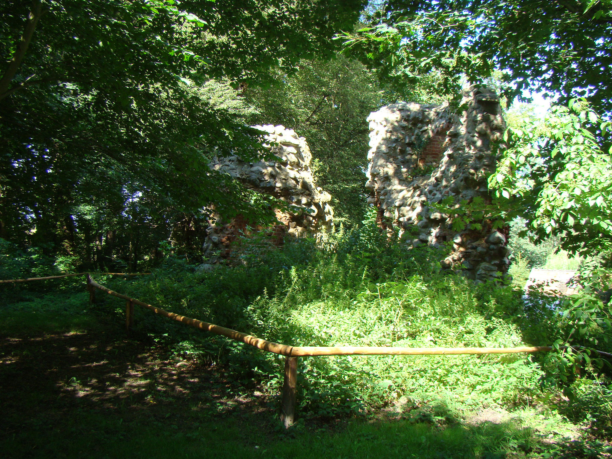 Mauerreste der Burg Grubenhagen bei Vollrathsruhe, Foto: Peter Schmelzle, August 2011